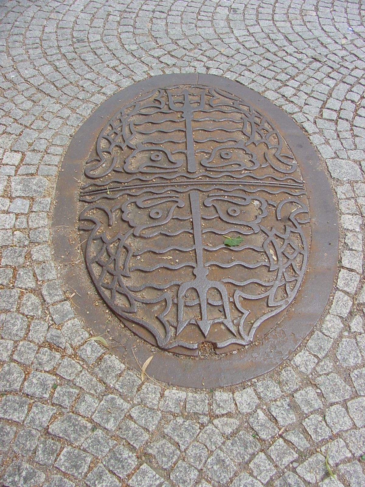 Kanaldeckel in Weimar, Germany. Kanaldeckel-Nachguss der Heinrichhütte Wurzbach/Thüringen.